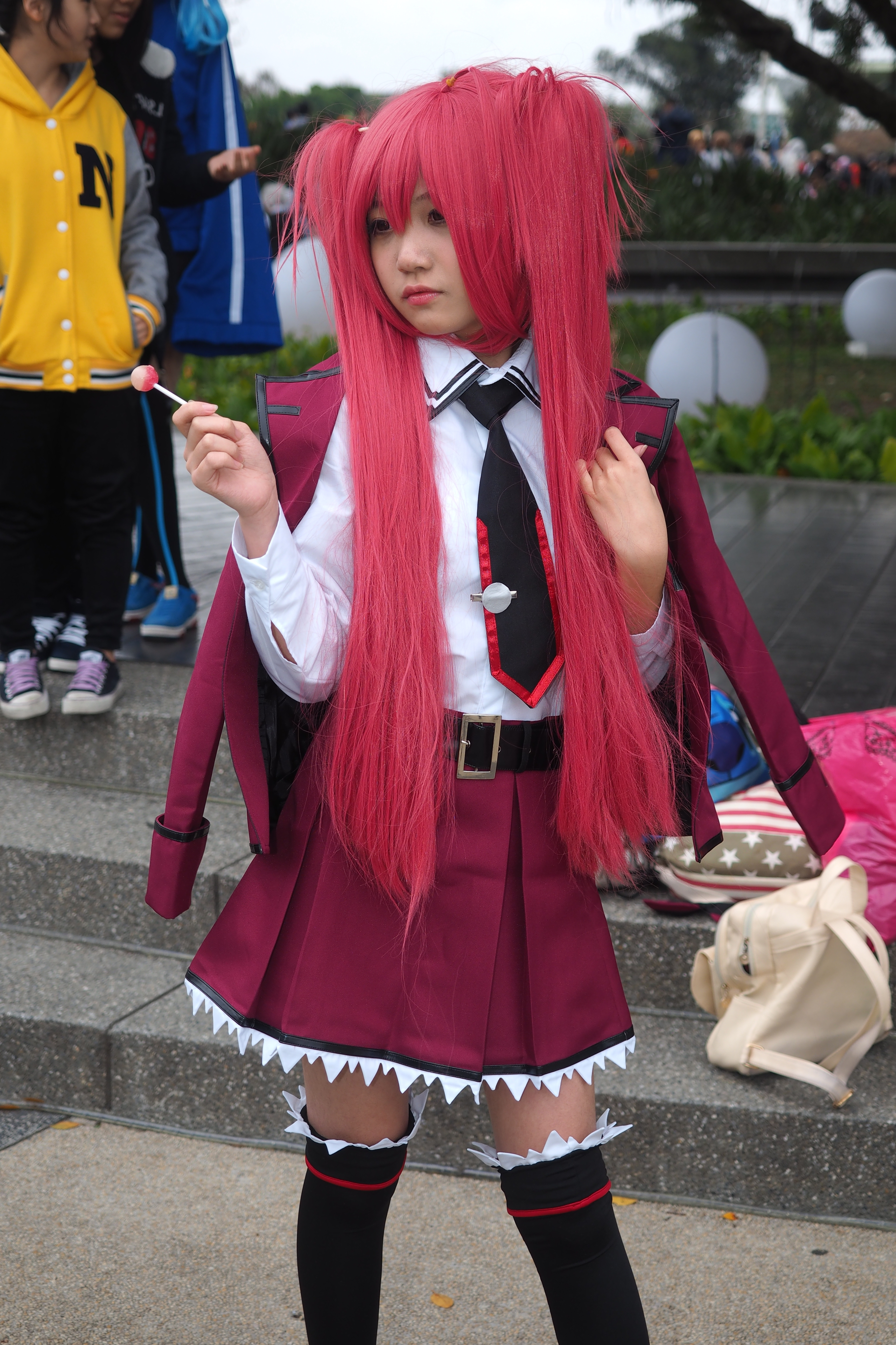 第25屆開拓動漫祭，《約會大作戰》五河琴里cosplayer。